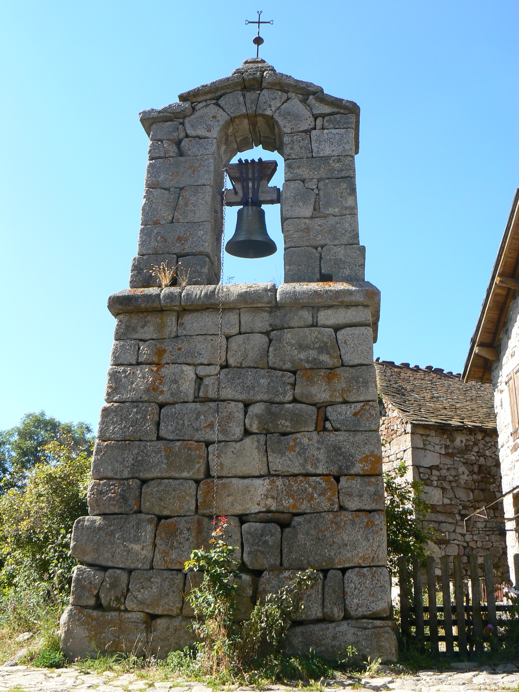 Clocher de tourmente du hameau des Sagnes, commune de Saint-Julien-du-Tournel, Lozère, France